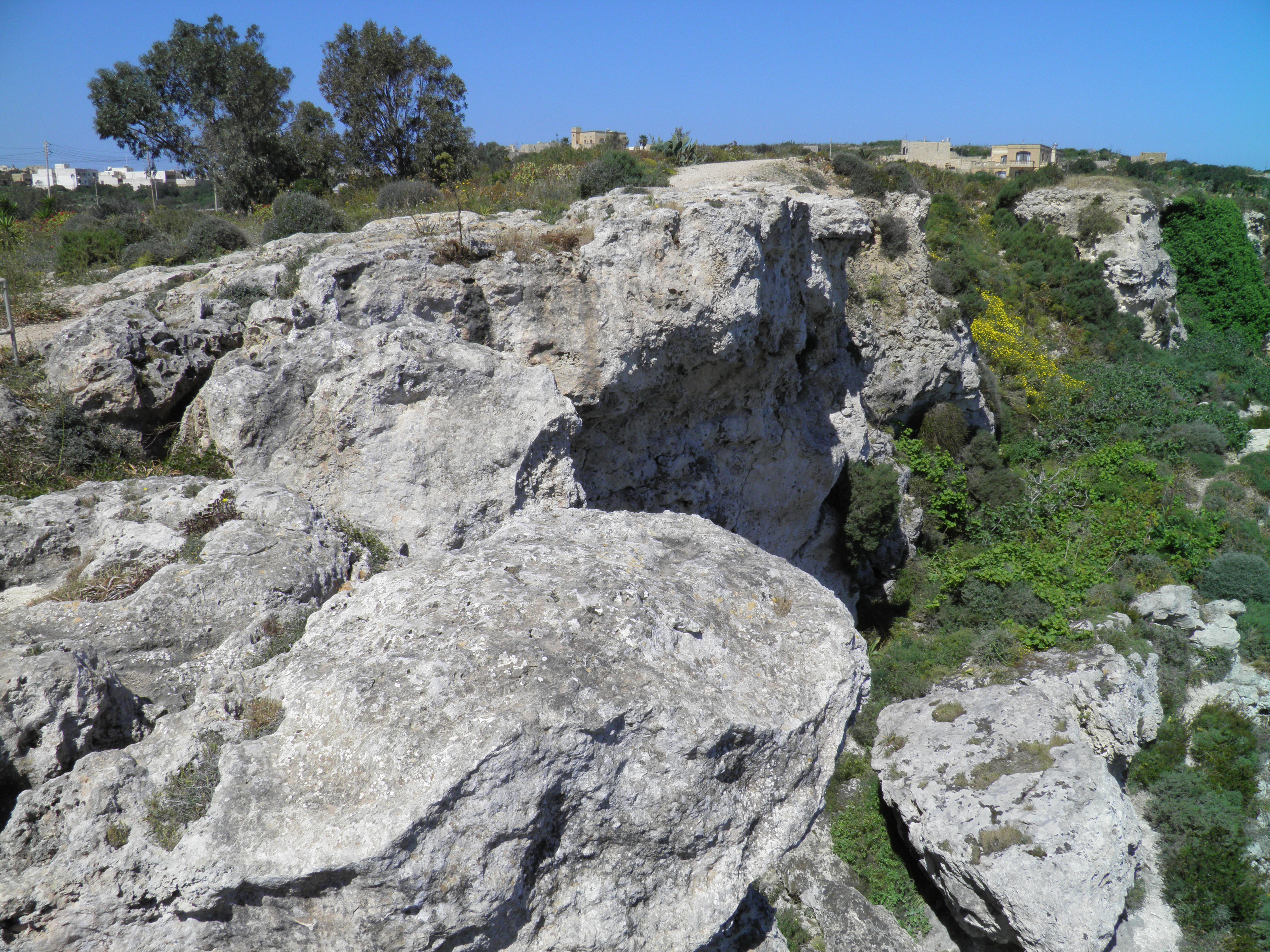 Calypso Cave, Gozo, Malta